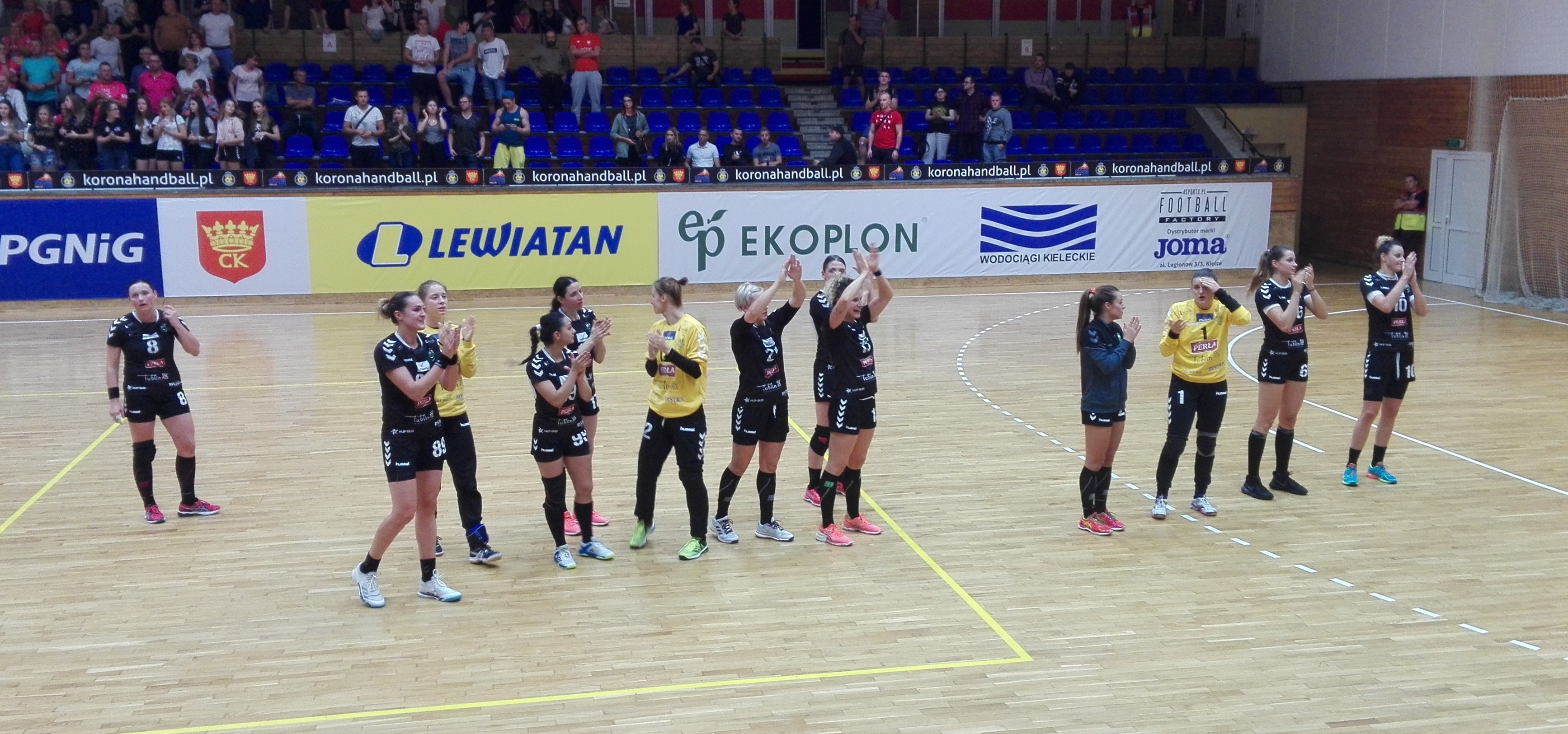 Kielce 9 września 2017 r. Drużyna MKS Lublin po zwycięskim meczu Superligi na wyjeździe z Koroną Handball (30÷16).